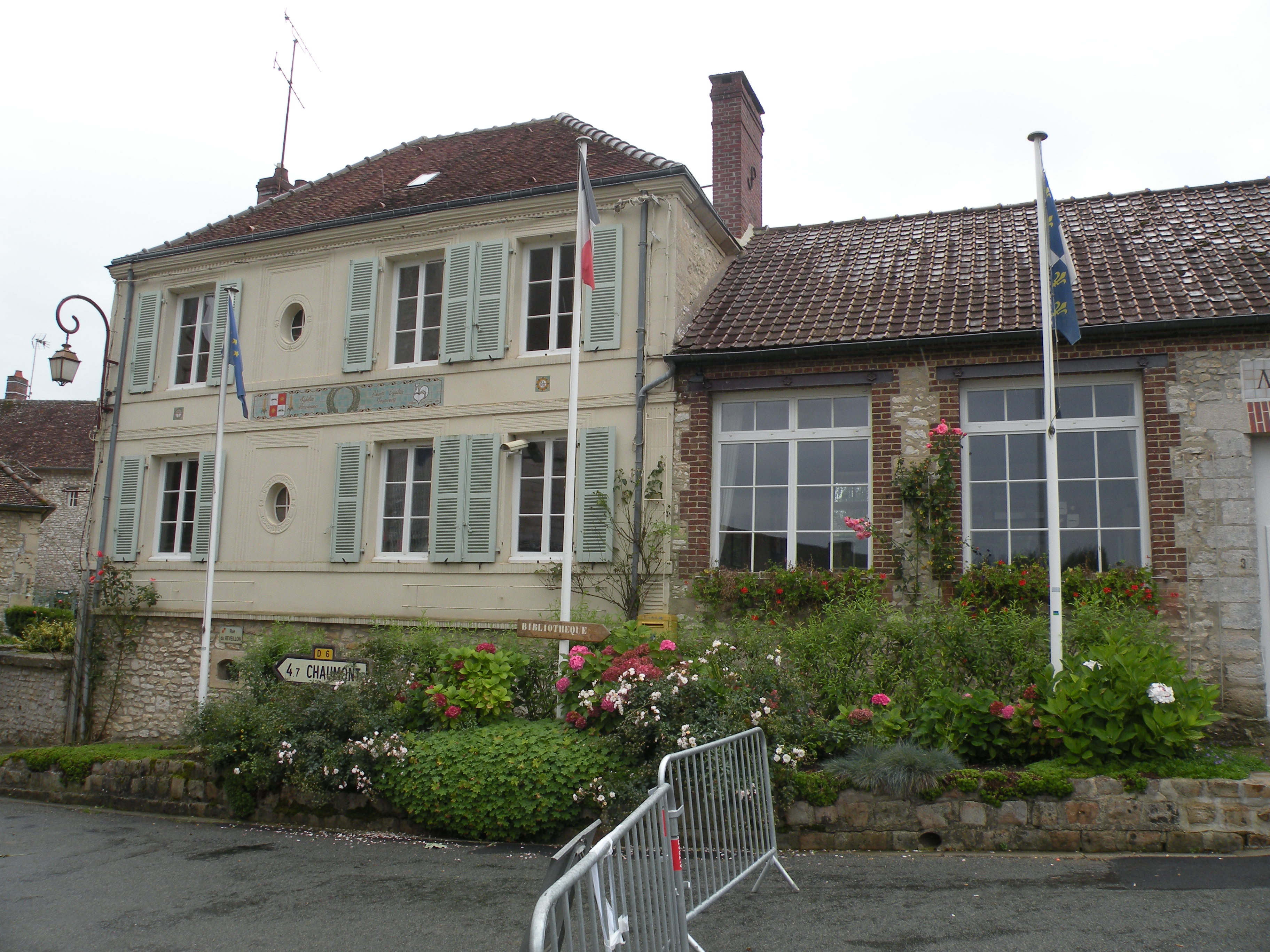 Reilly mairie